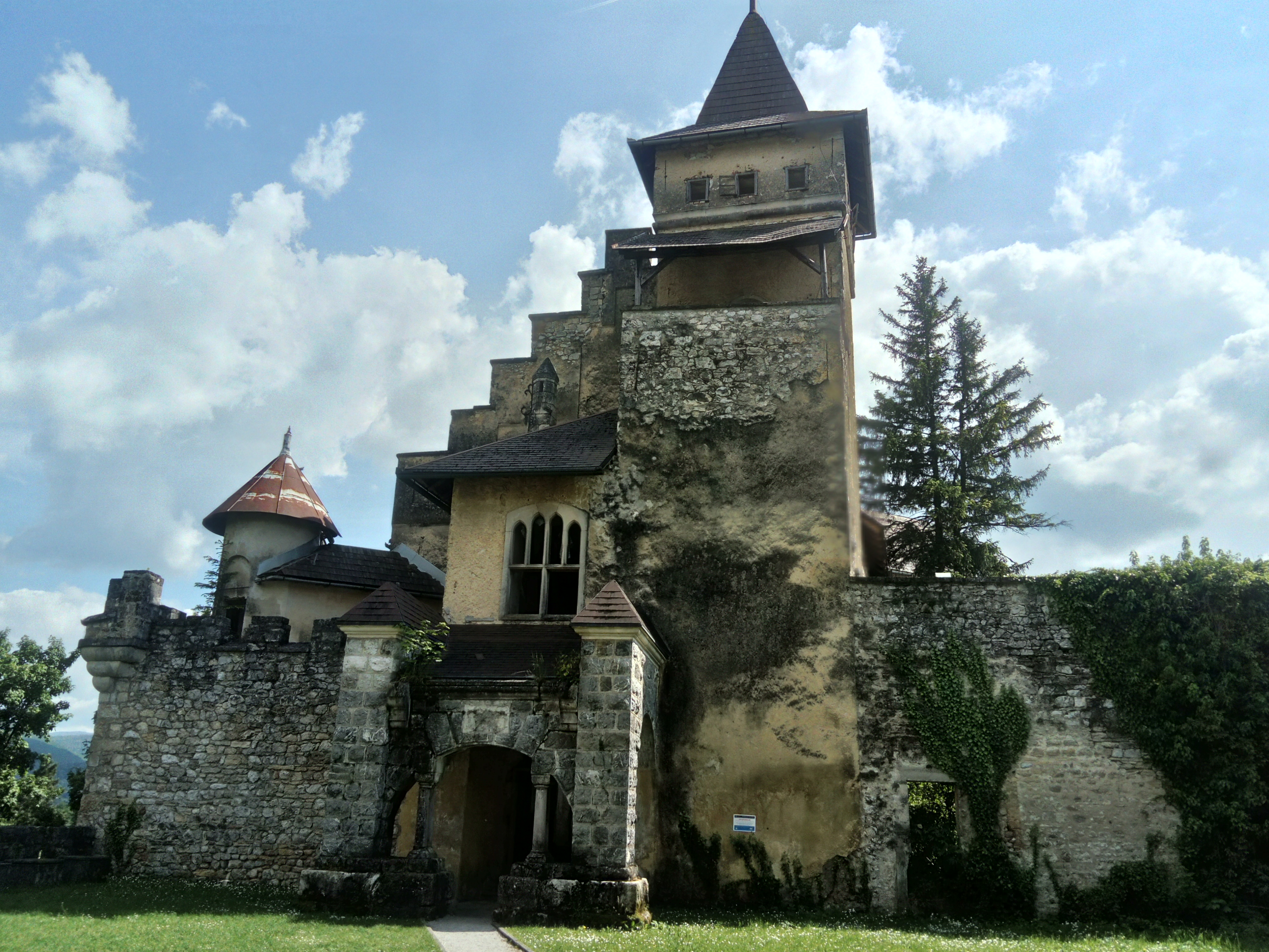 Stari grad Ostrožac (16. 5. 2017)